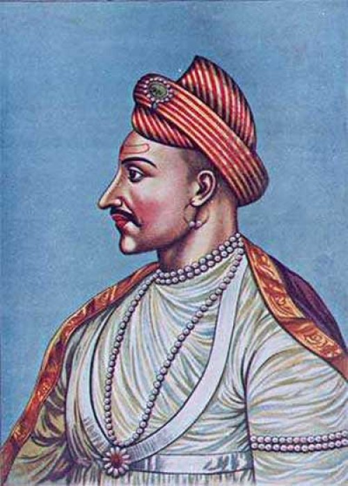 Madhav Rao